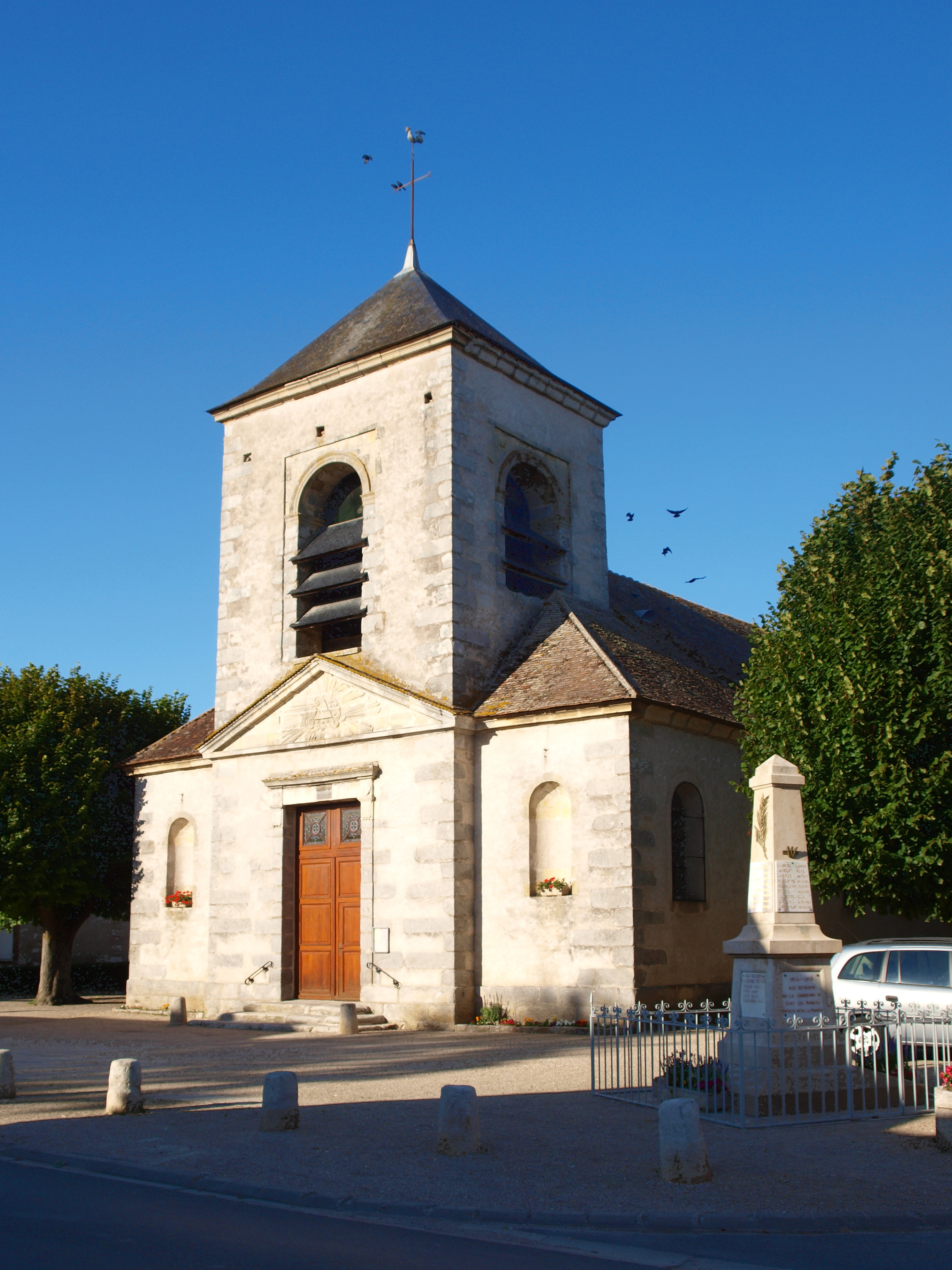 Église paroissiale de Gisy-les-Nobles (Yonne, France)